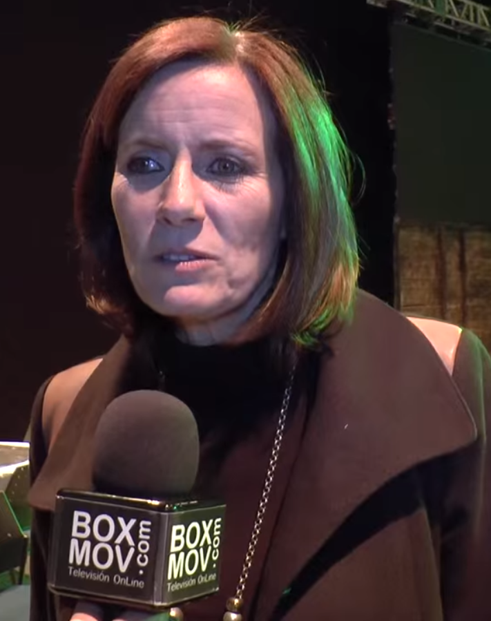 Kristina Lilley en lanzamiento de la telenovela "Esmeraldas" en 2015